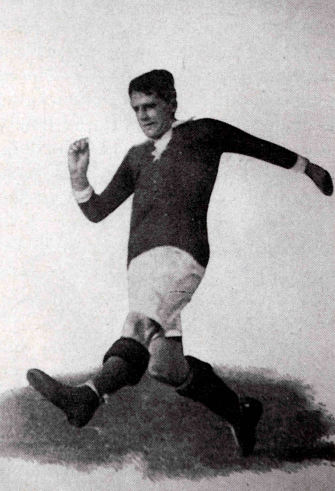 Gottfried Fuchs in action